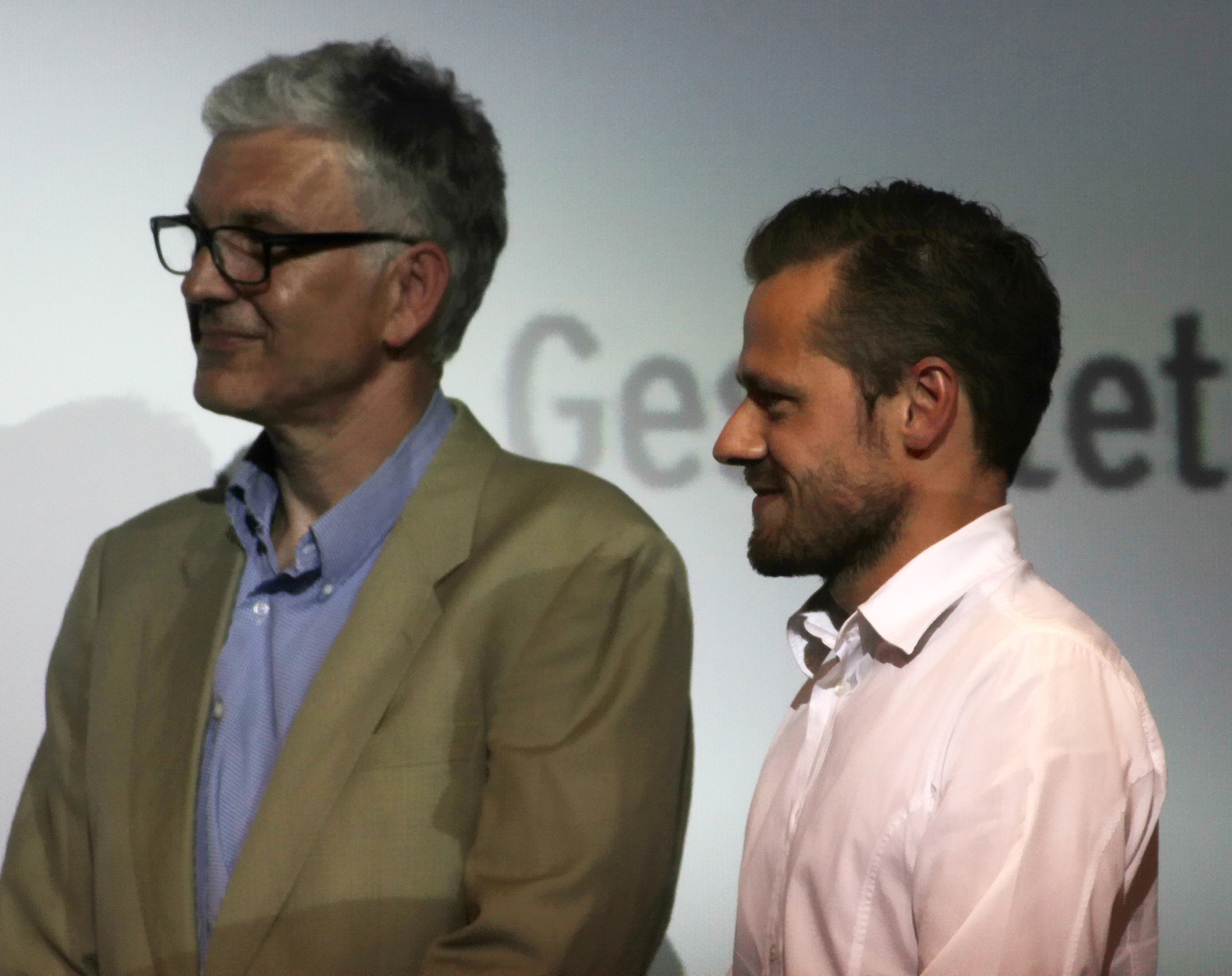 Rechts Sven Waasner - spielte die Rolle "Sven Schäuffele" im Film "Bamberger Reiter", links Michael Gutmann (Regie). Aufgenommen bei der Preisverleihung zum Bernd Burgemeister Fernsehpreis. Dort war "Bamberger Reiter" unter den nominierten Filmen.